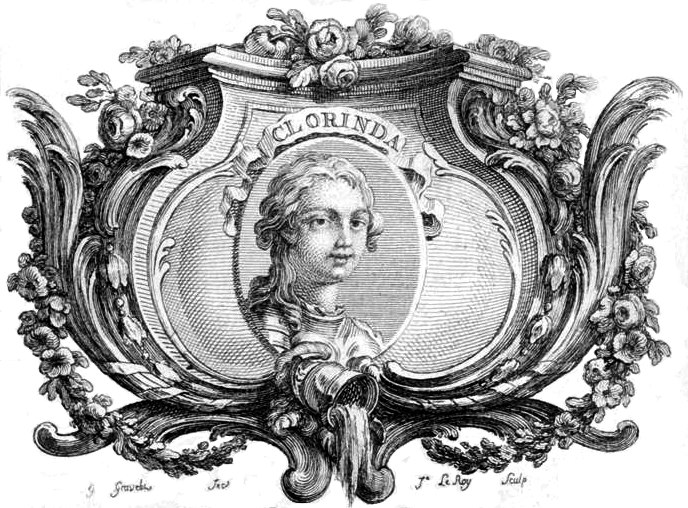 Immagine dal libro La Gerusalemme liberata, Agostino Delalain, Pietro Durand, Gio. Claudio Molini, Parigi, 1771